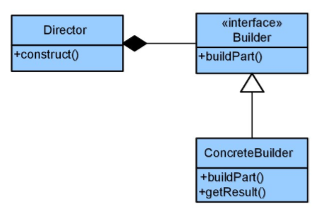 UML-діаграма структури класів для патерну програмування "Будівельник"